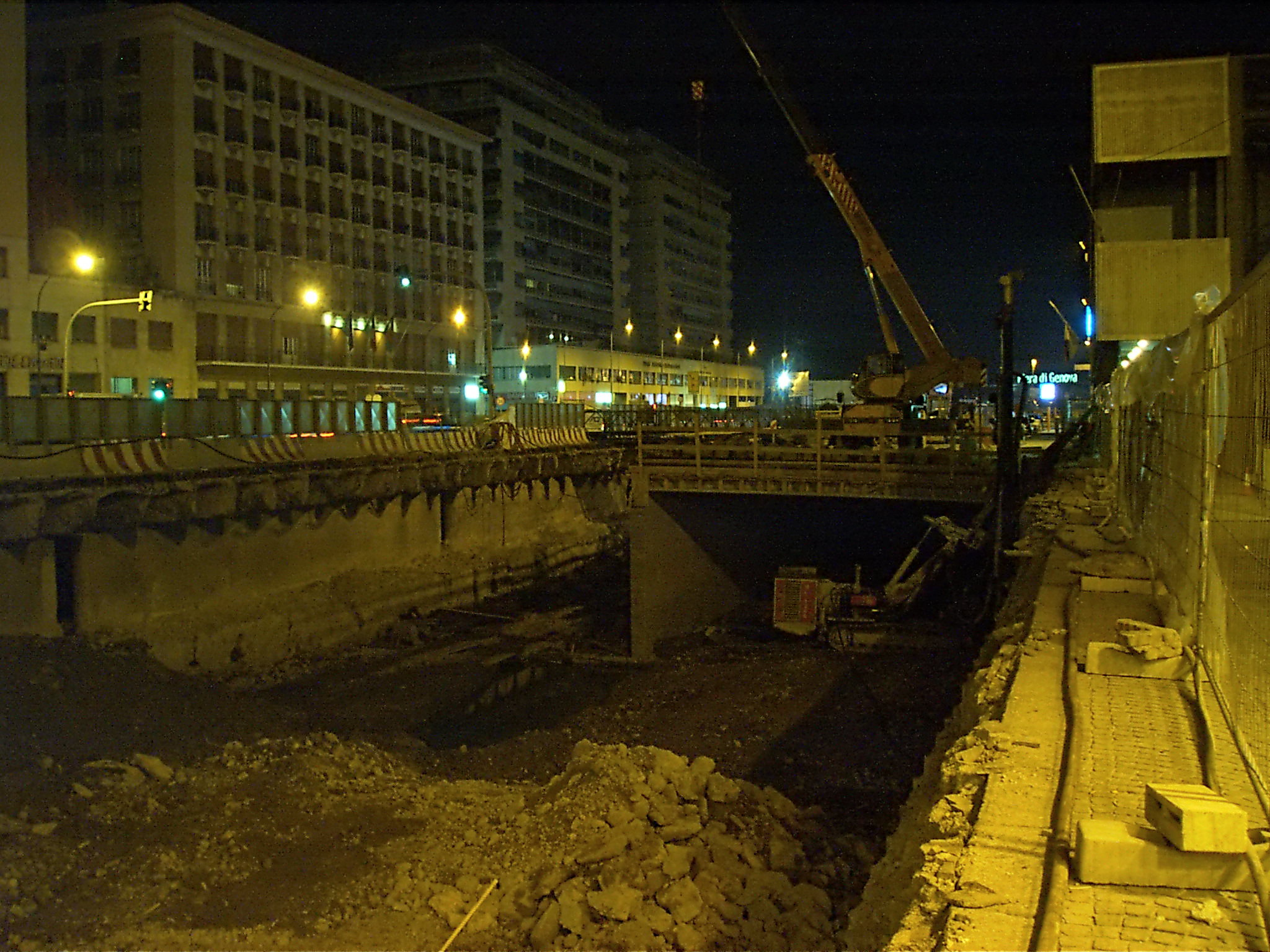 Lavori di rifacimento della copertura del torrente Bisagno, vicino alla foce, Genova